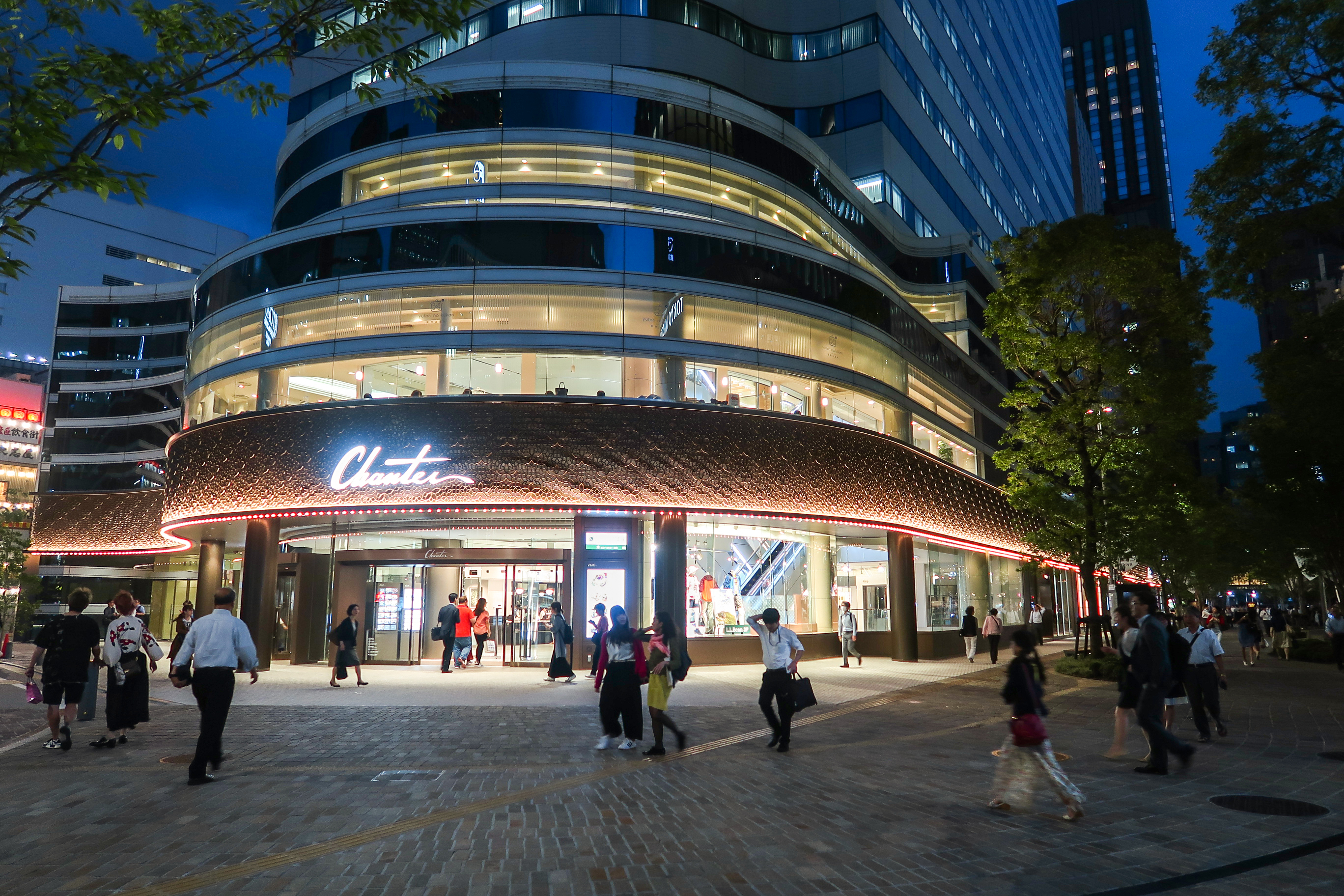 Hibiya Chanter